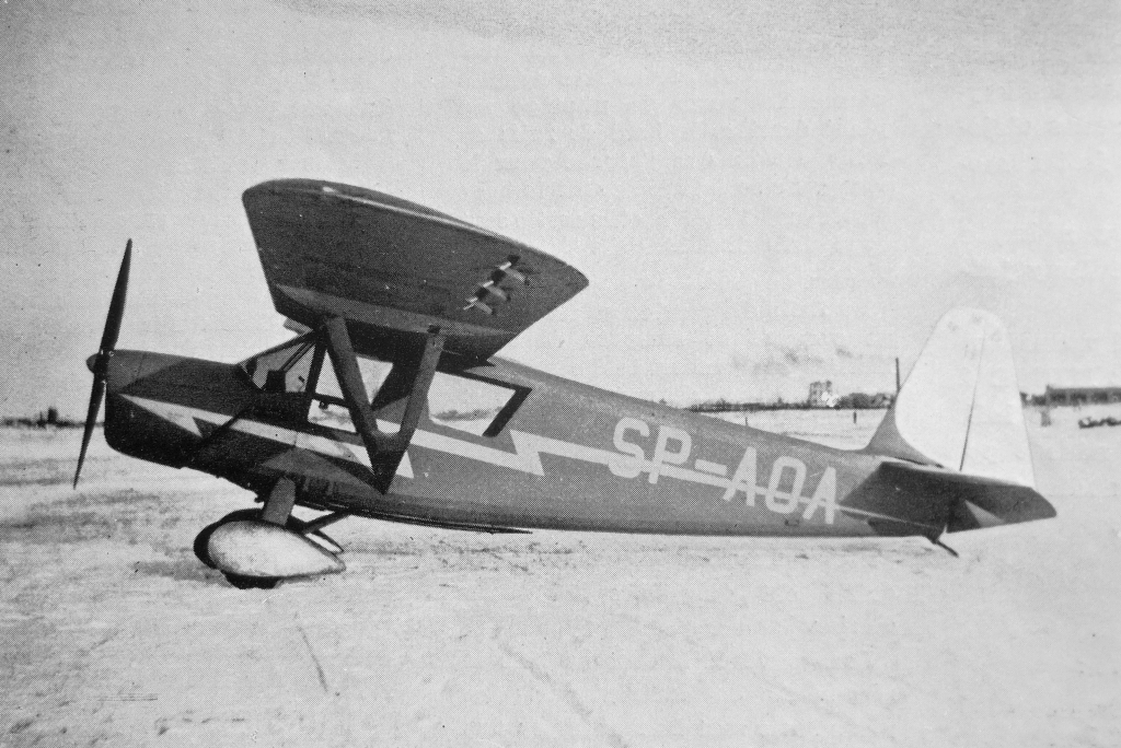 letecký motor Walter Major 4 a letoun RWD 13